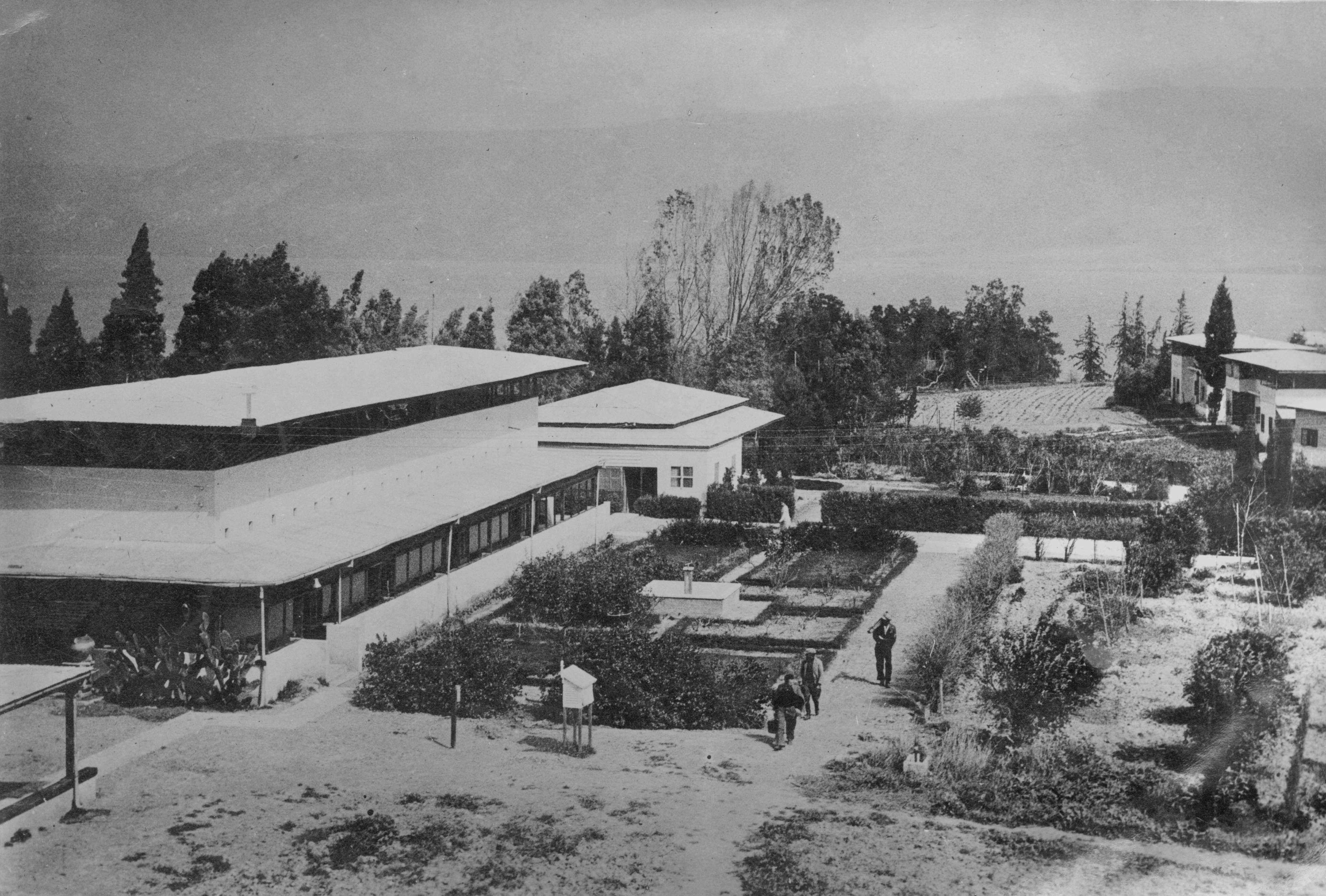 תמונה היסטורית של בית החינוך המשותף דגניה שהוא בית ספר שמונה-שנתי הנמצא בקיבוץ דגניה א' שבעמק הירדן. בית החינוך, שנוסד בשנות ה-20 של המאה ה-20, הוא בית הספר הקיבוצי הראשון.